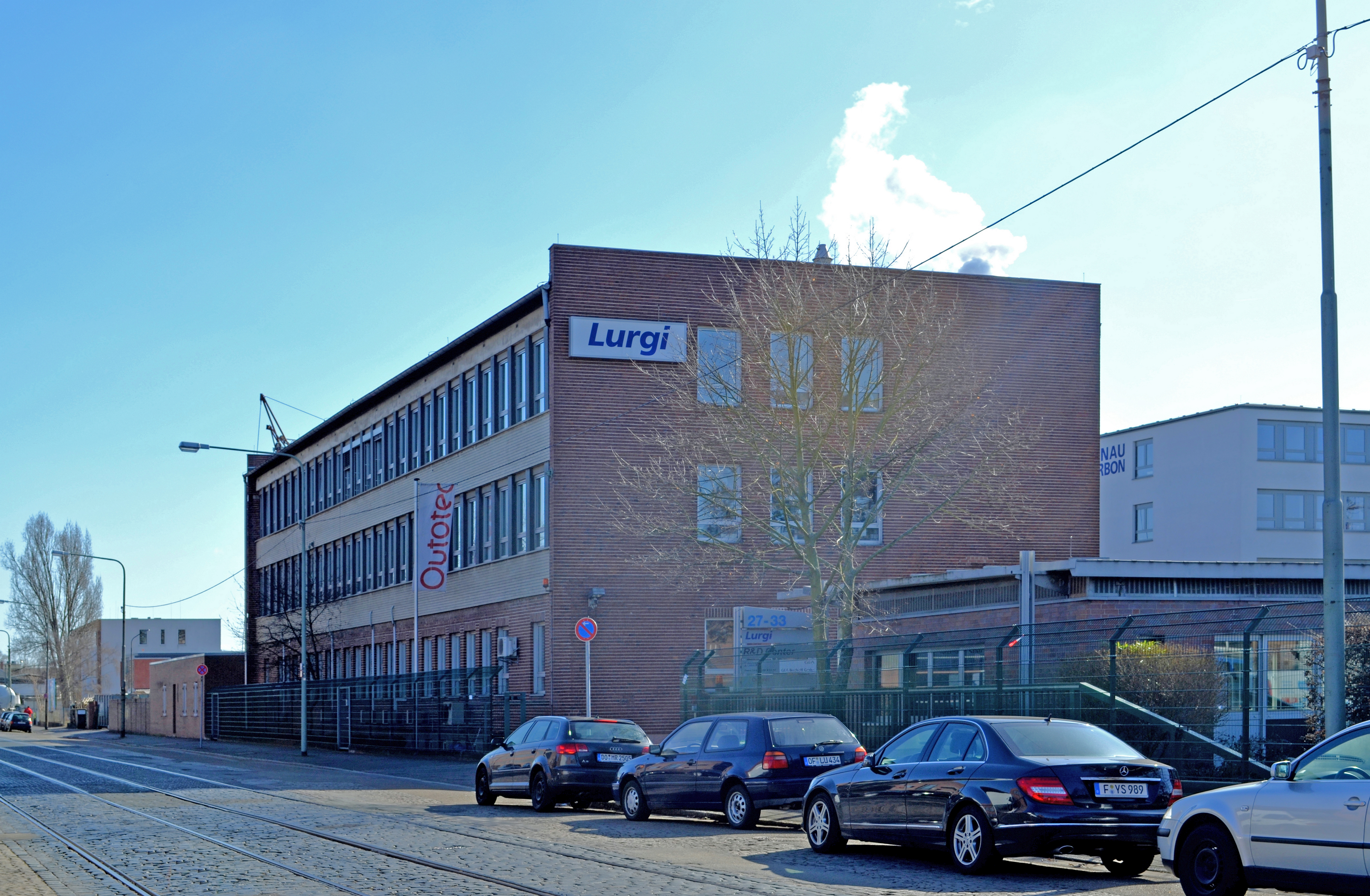 Frankfurt-Seckbach, Gwinnerstraße, Blick auf Teilbereich/Teilbebauung des ehemaligen 18 Gebäude umfassenden 26.000 m² großen Firmengeländes der vormaligen Hans J. Zimmer AG, der späteren Lurgi/Zimmer AG. Das Unternehmen wurde 2007 an die französische Air Liquide Gruppe verkauft. Derzeitiger Grundstückseigentümer GEA Real Estate will das Gelände komplett räumen und dann verkaufen.